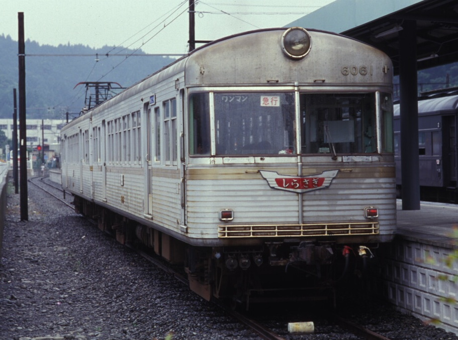 大井川鐵道クハ6061